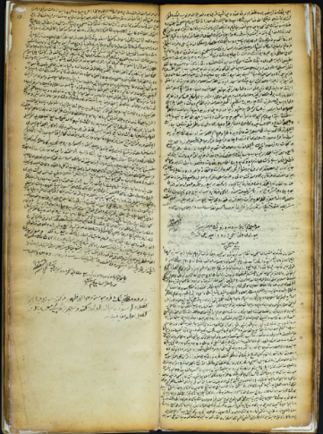 Sidžil visočkog kadije (1825 - 1829)